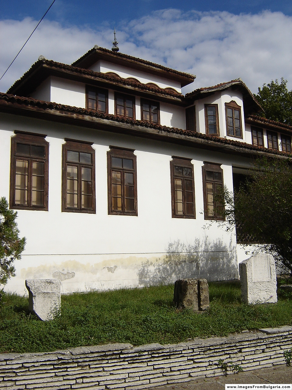 Vidin, Bulgaria This file, which was originally posted to , is licensed under Creative Commons Attribution 2.5 License. Attribution: Petar Iankov In short: you are free to distribute and modify the file as long as you attribute its author(s) or licensor(s).Check for other images from this website. Този файл, оригинално качен на сайта , е лицензиран под условията на лиценза Creative Commons Признание 2.5. Признание: Petar Iankov Накратко: имате свободата да разпространявате и променяте файла, стига да посочвате неговия (неговите) автор(и) или лицензодател(и).Разгледайте други картинки от този уебсайт.